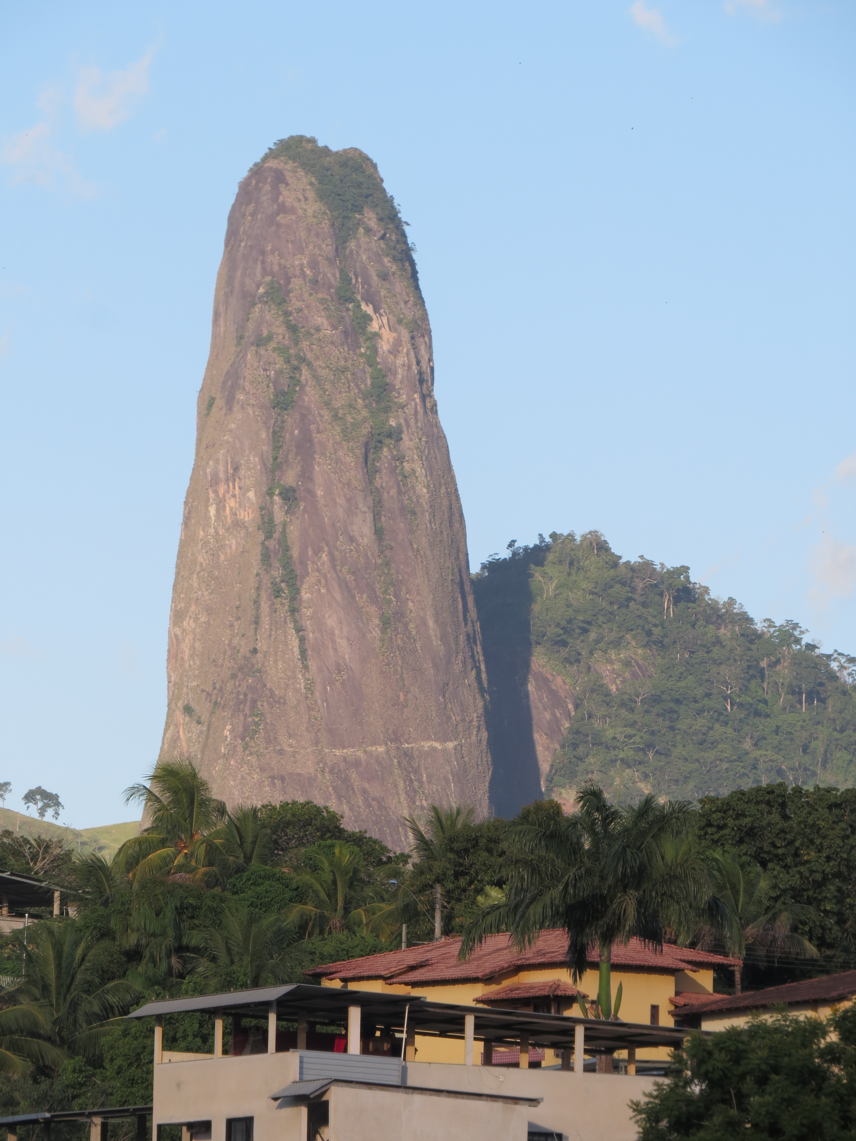 Pedra do Itabira vista da cidade de Cachoeiro de Itapemirim, ES.